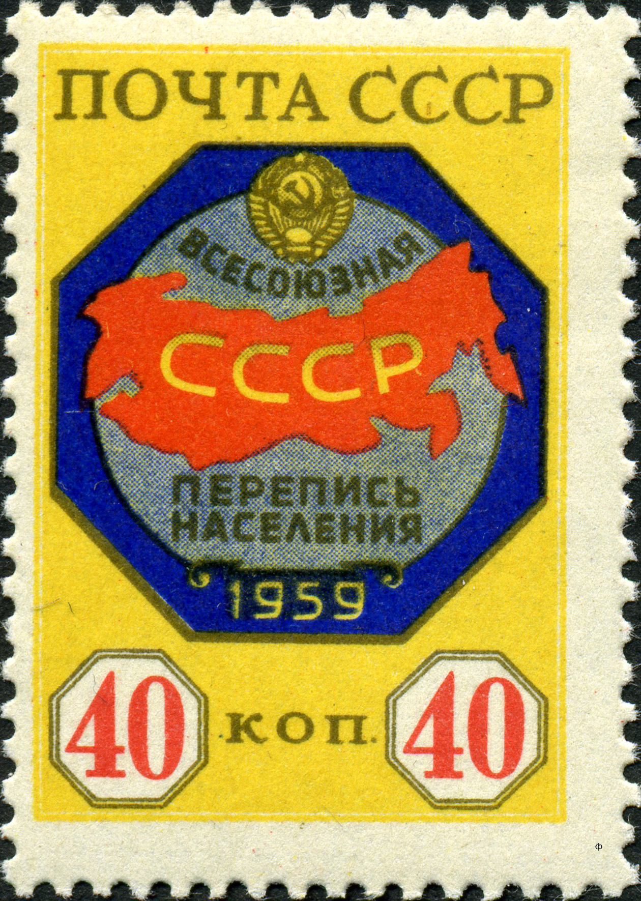 Марка СССР